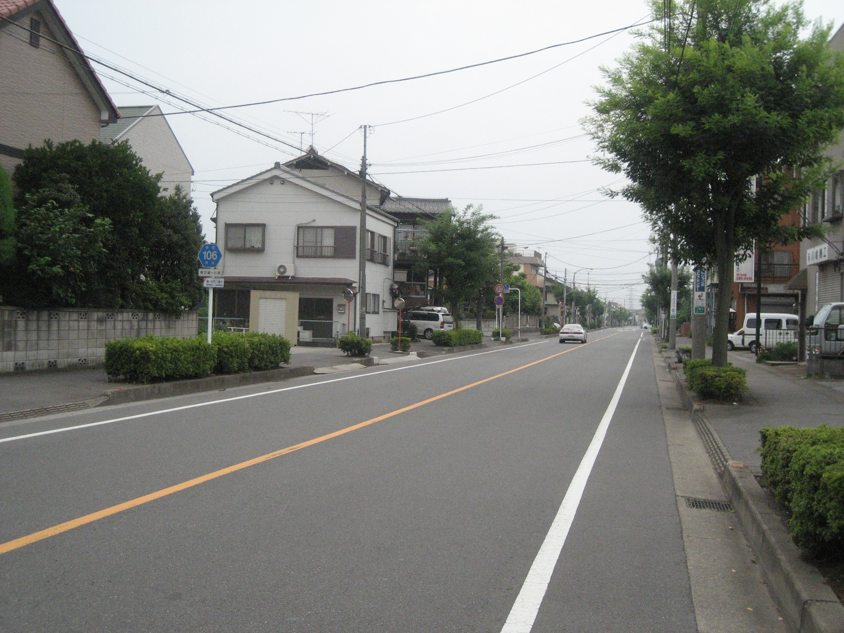 埼玉県道106号線鳩ヶ谷市内